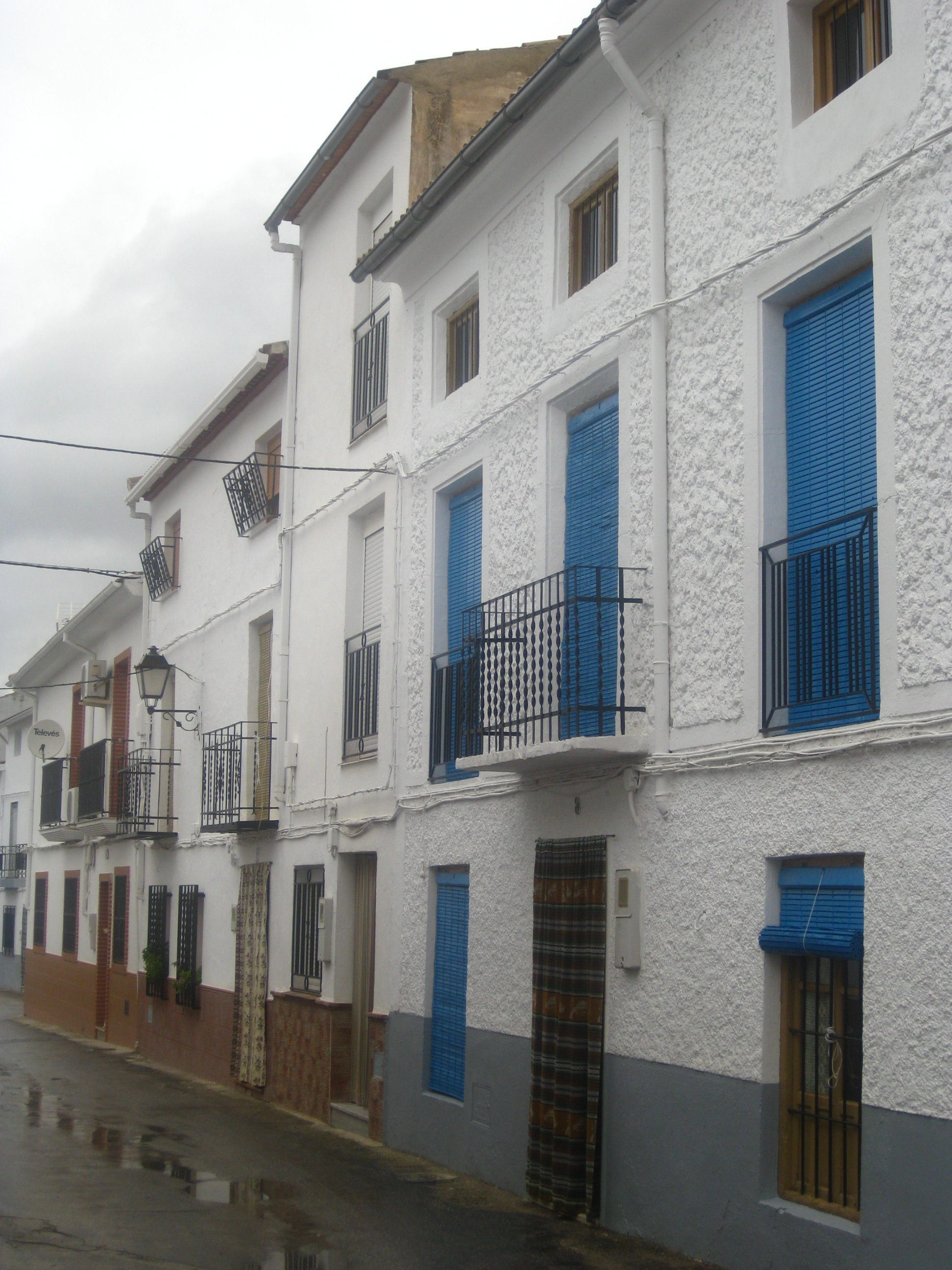 Calle típica. Octubre de 2012